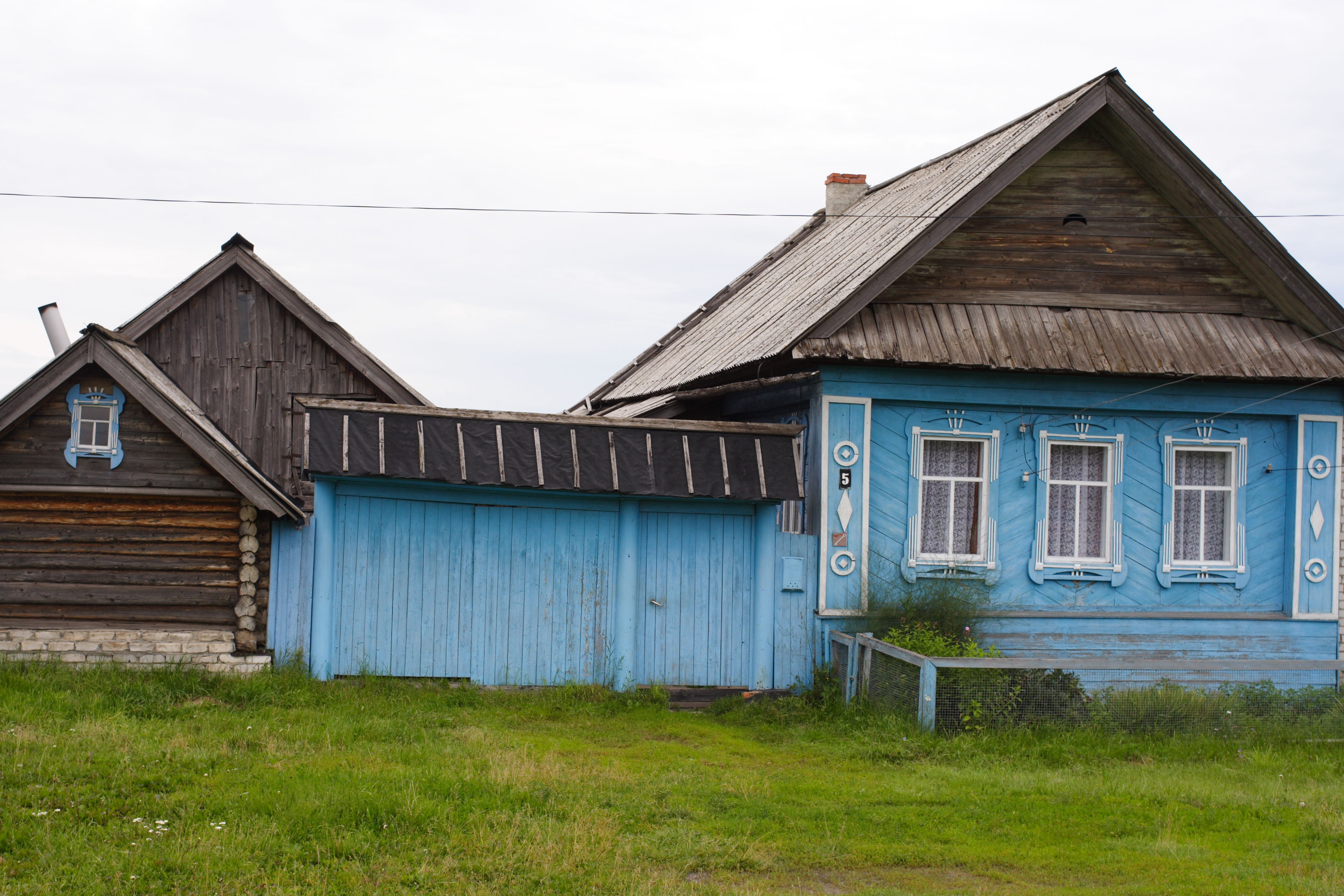 Lulpany village